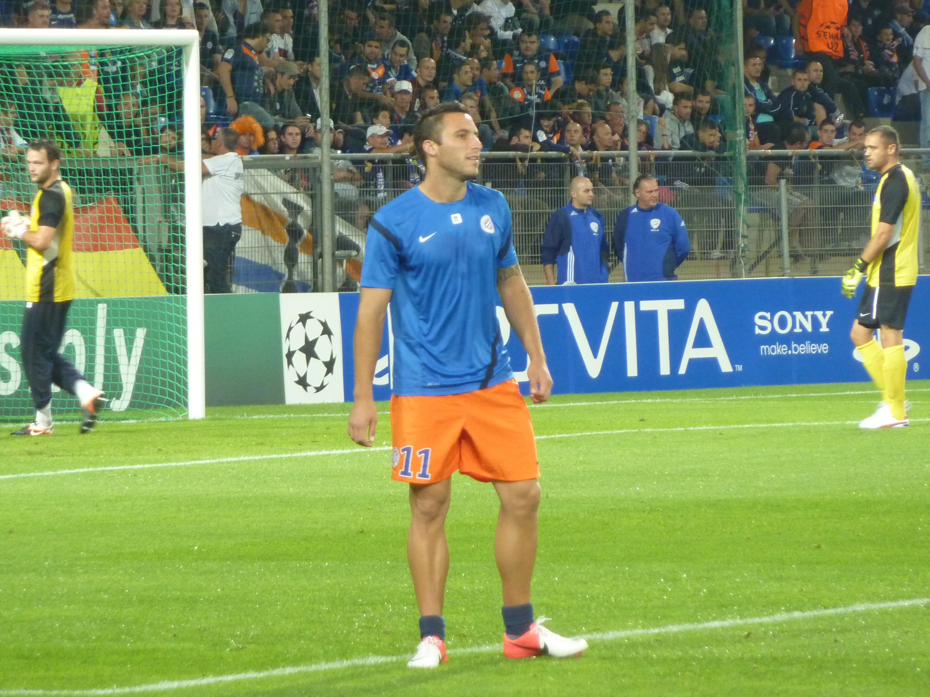 Emanuel Herrera lors du match MHSC - Arsenal (Ligue des Champions, Phase de poules, 1er match, 18/09/2012)